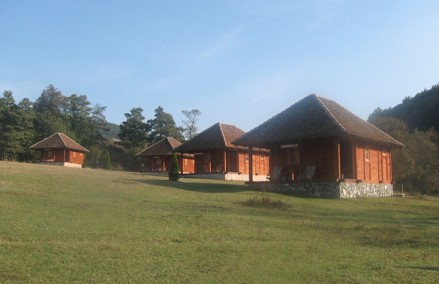 Скакавци код Косјерића.